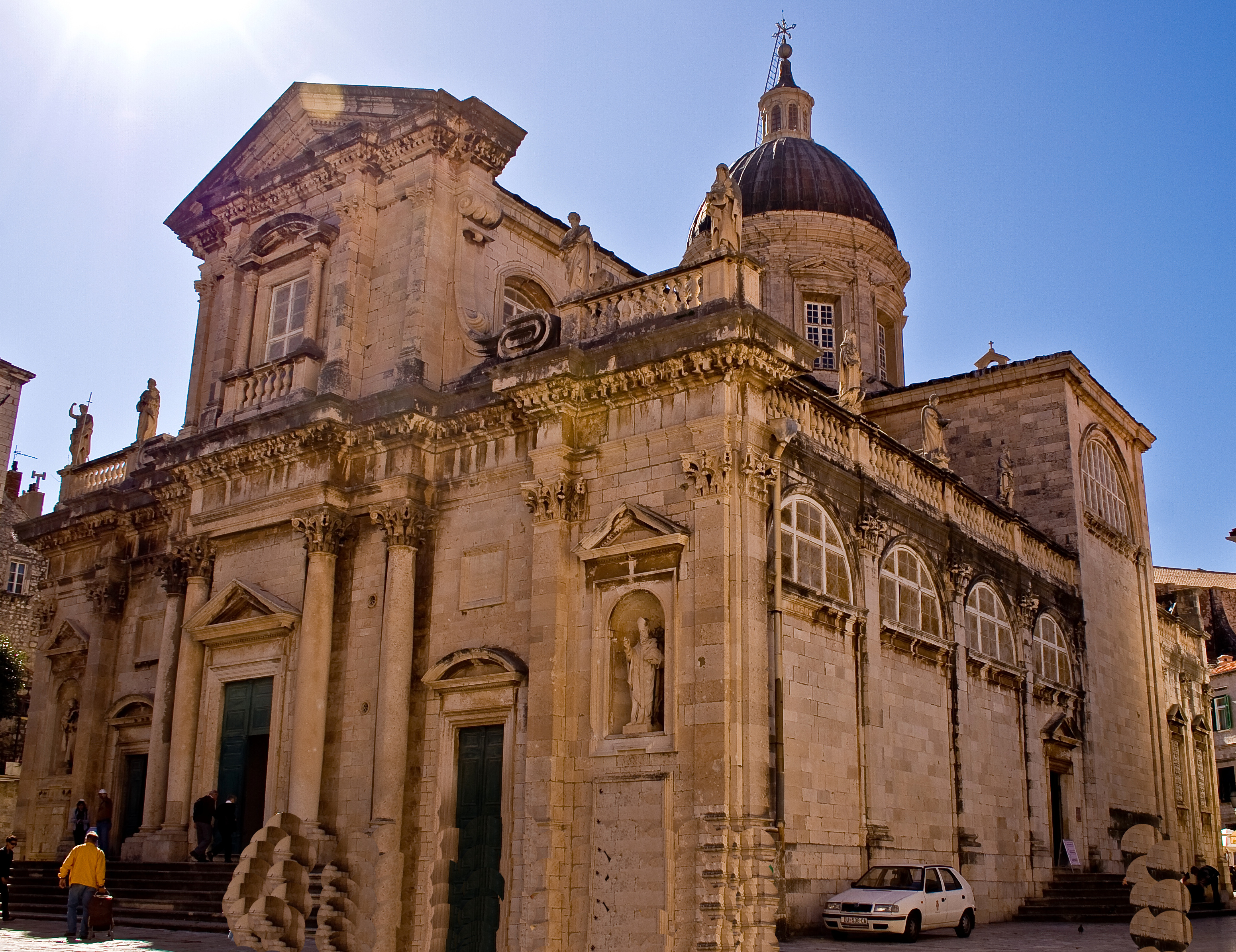 Kathedrale Mariä Himmelfahrt (Velika Gospa) in Dubrovnik (Kroatien)